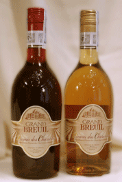 Пино де Шарант "Grand Breuil"